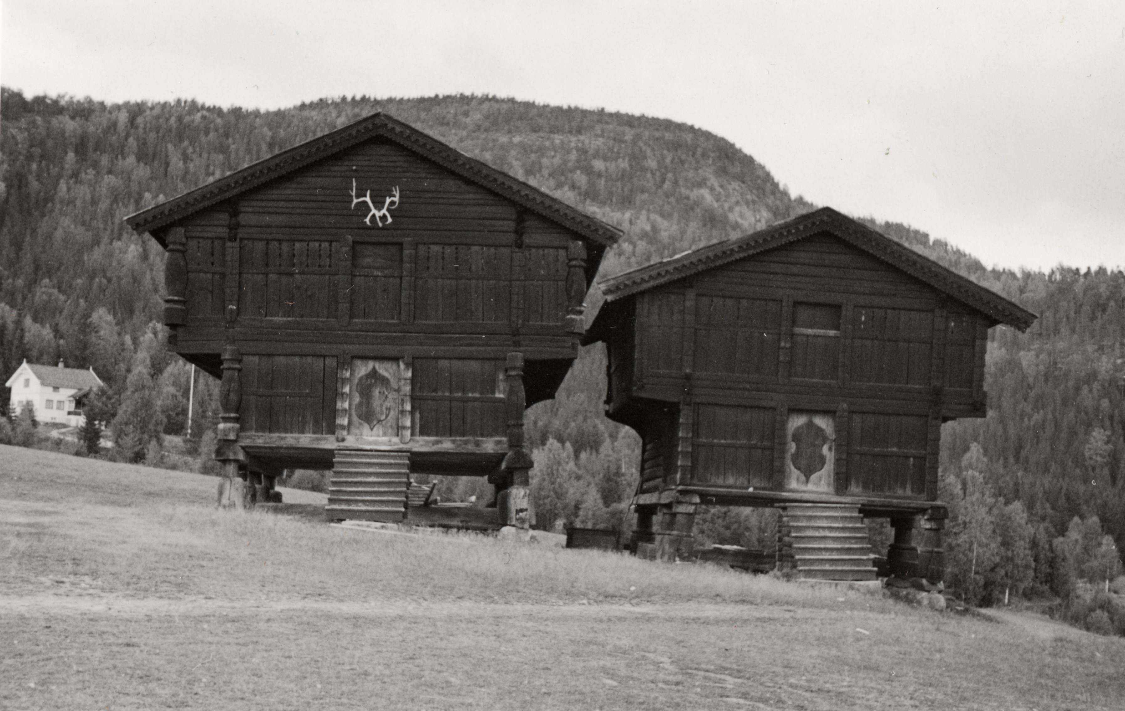 Ringnes i Krødsherad, Buskerud